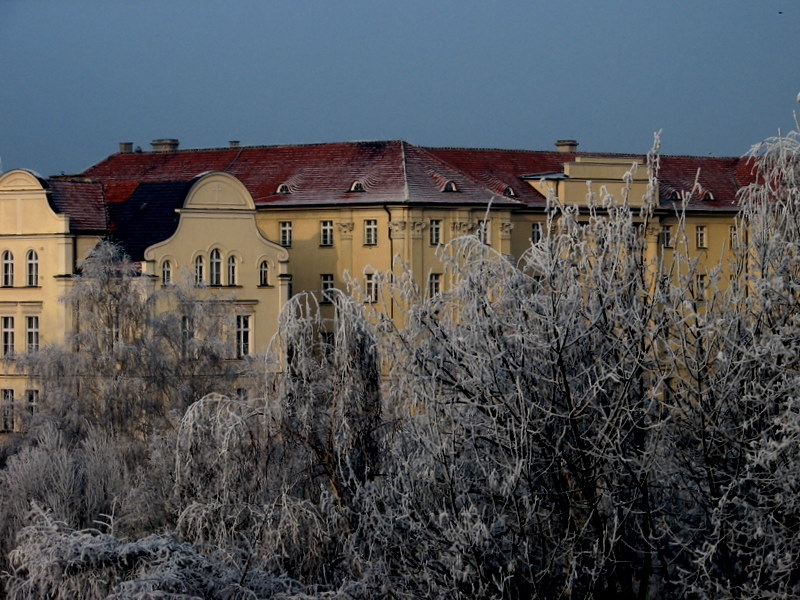 Prymasowskie Wyższe Seminarium Duchowne